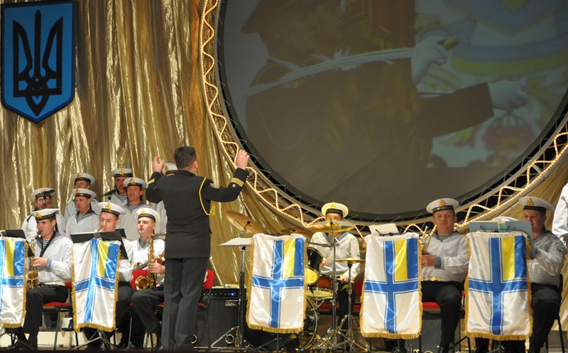 22-я годовщина ВС Украины в Севастополе